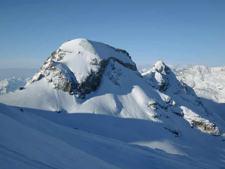 Ciarforon